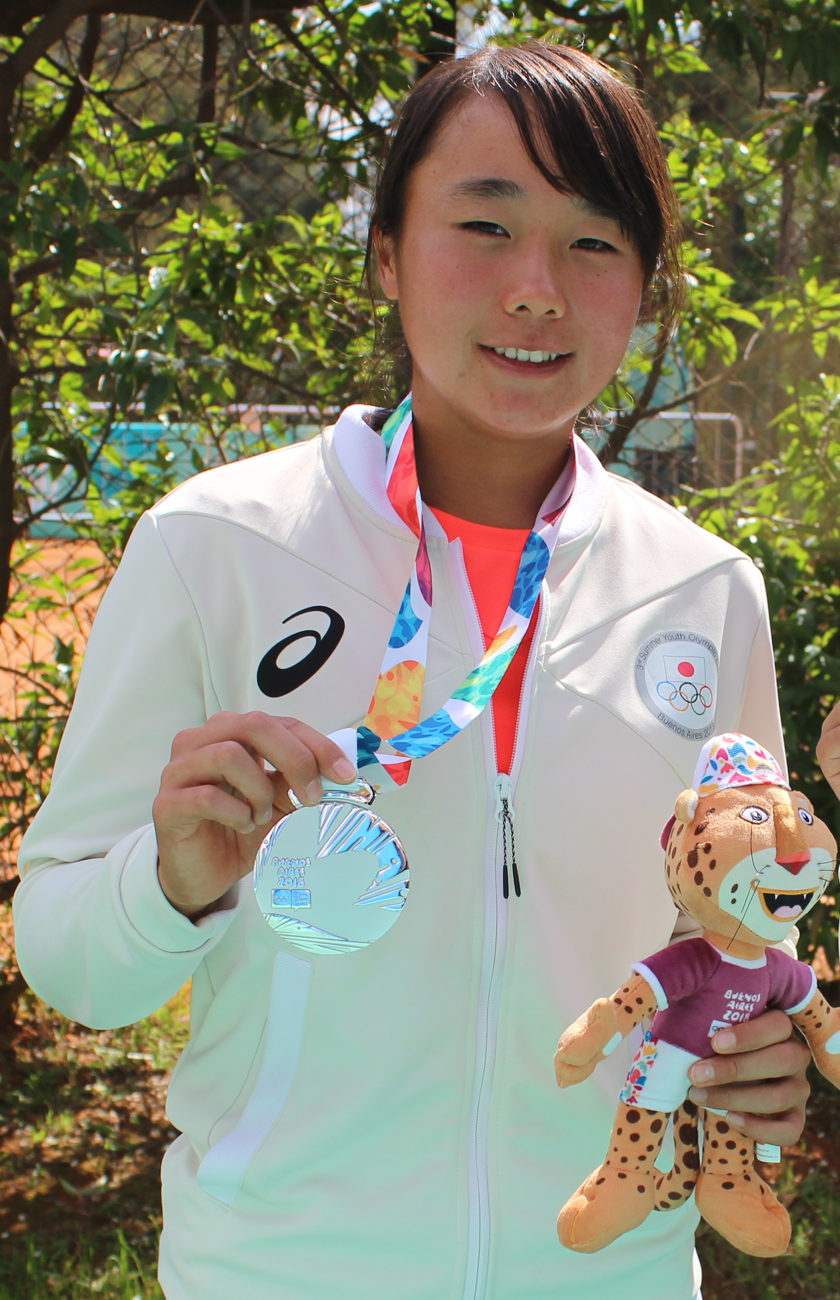 Medallistas en tenis dobles femenino.